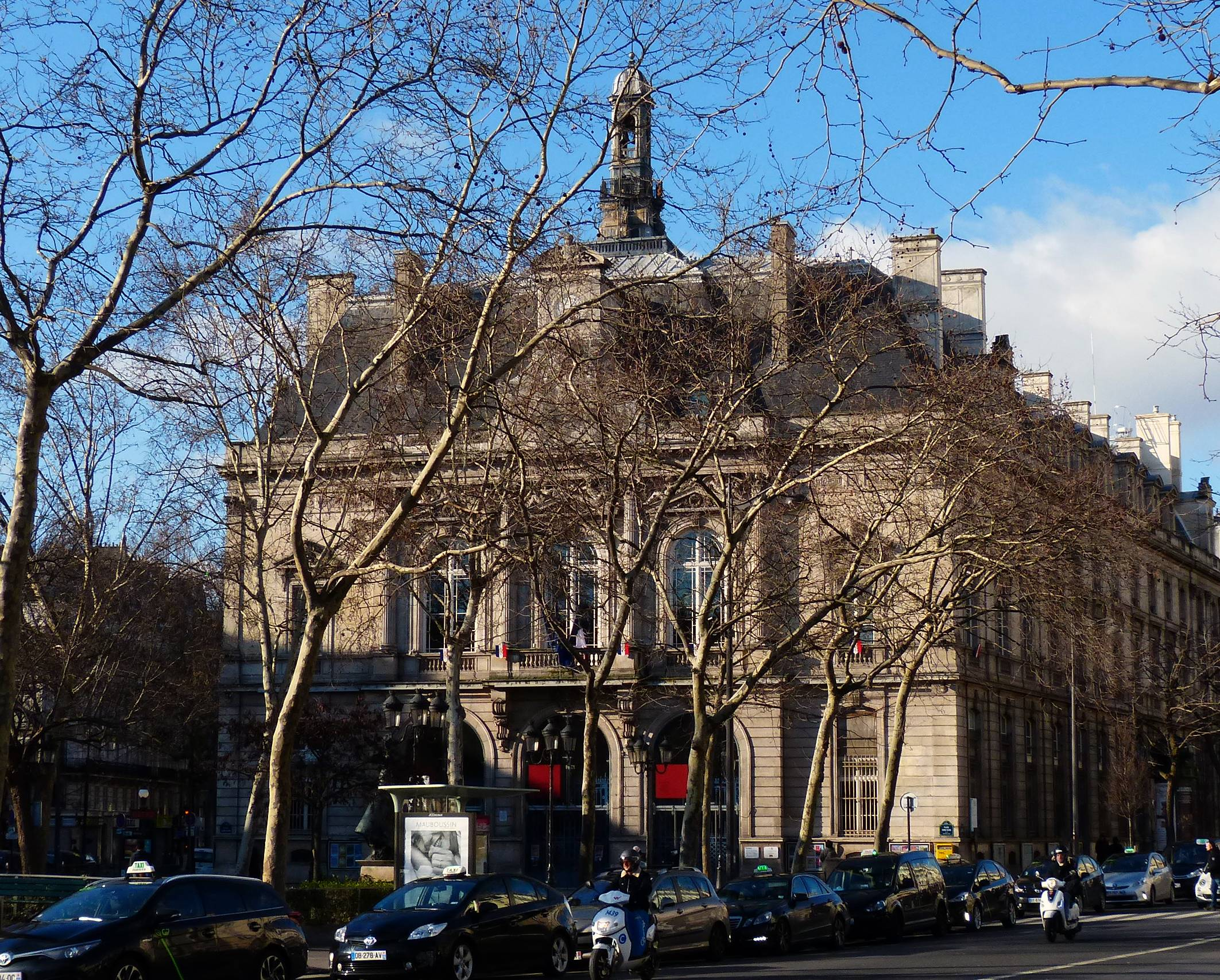 Mairie du 11ème arrondissement de Paris